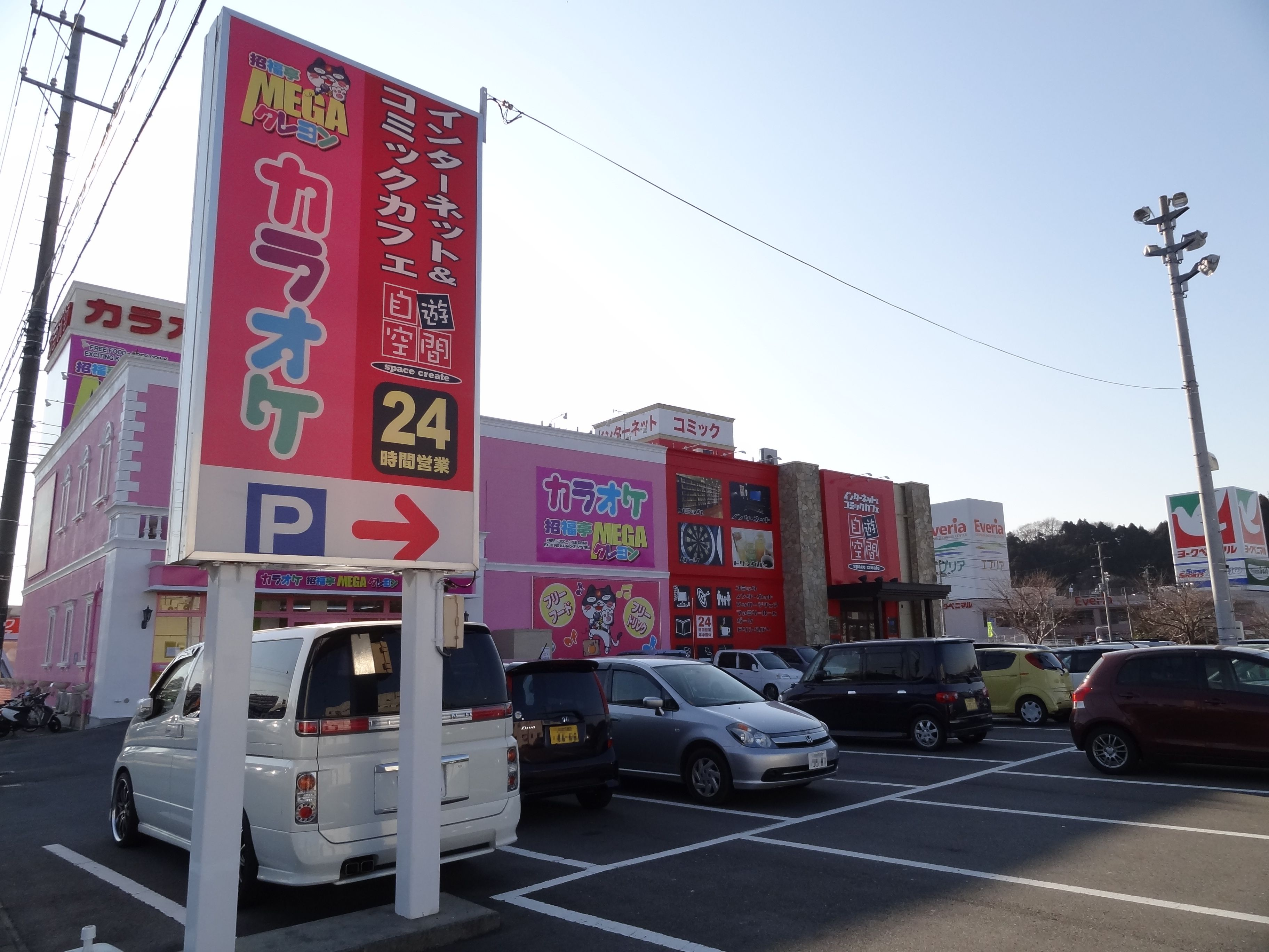 自遊空間いわき鹿島店・カラオケ招福亭クレヨンMEGAいわき鹿島店